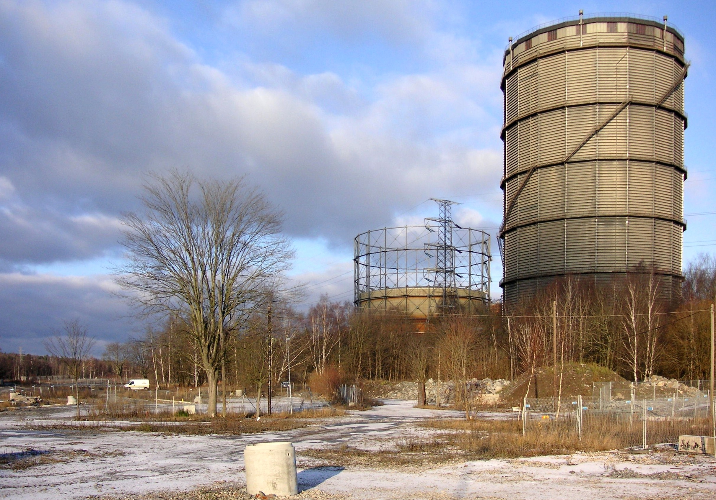 Norra Djurgårdsstaden innan byggarbeten november 2007